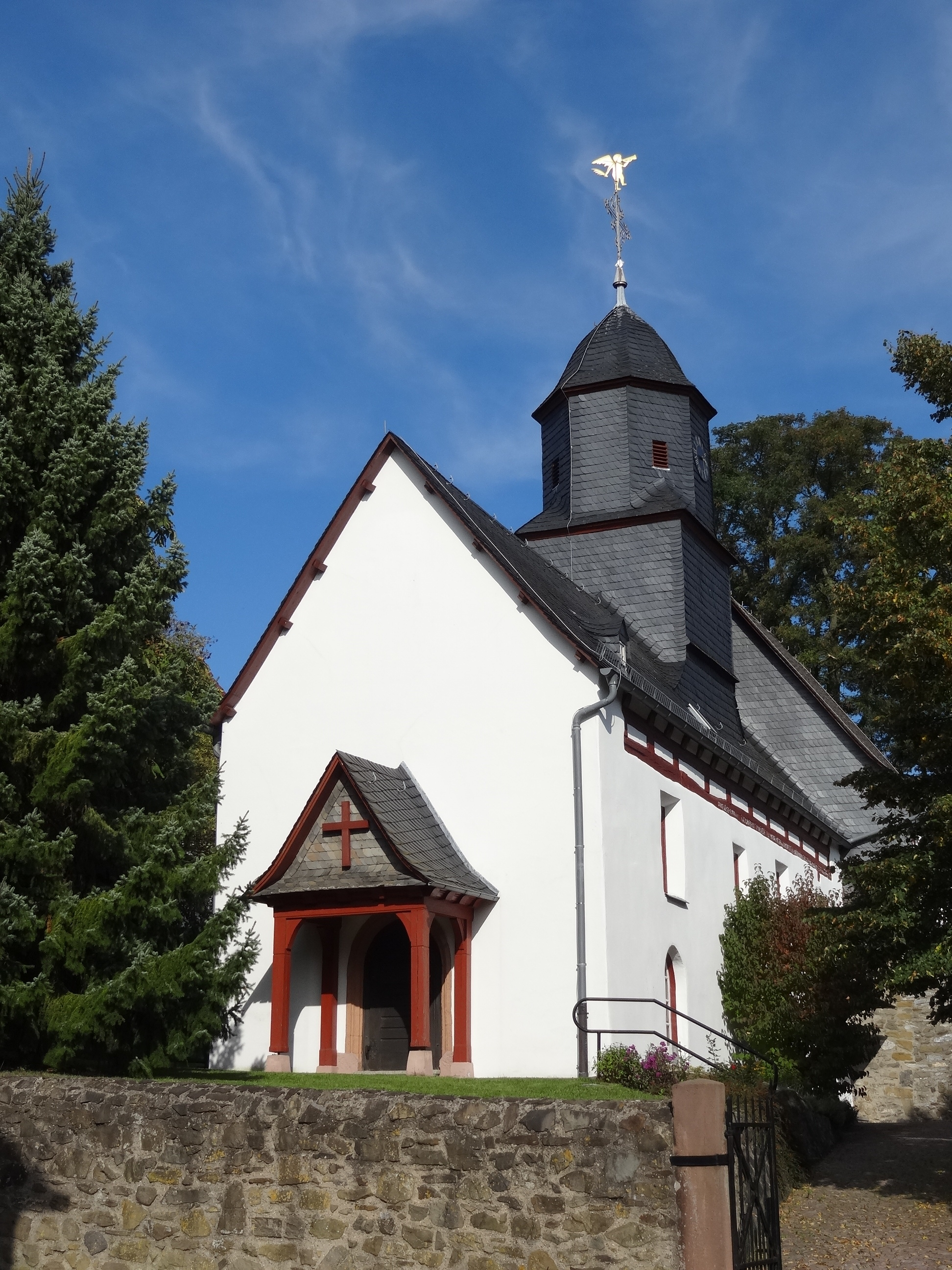 Evangelische Pfarrkirche Reiskirchen